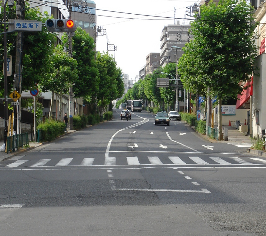 2006年当時の魚籃坂下交差点から坂の頂上方面を望む魚籃坂